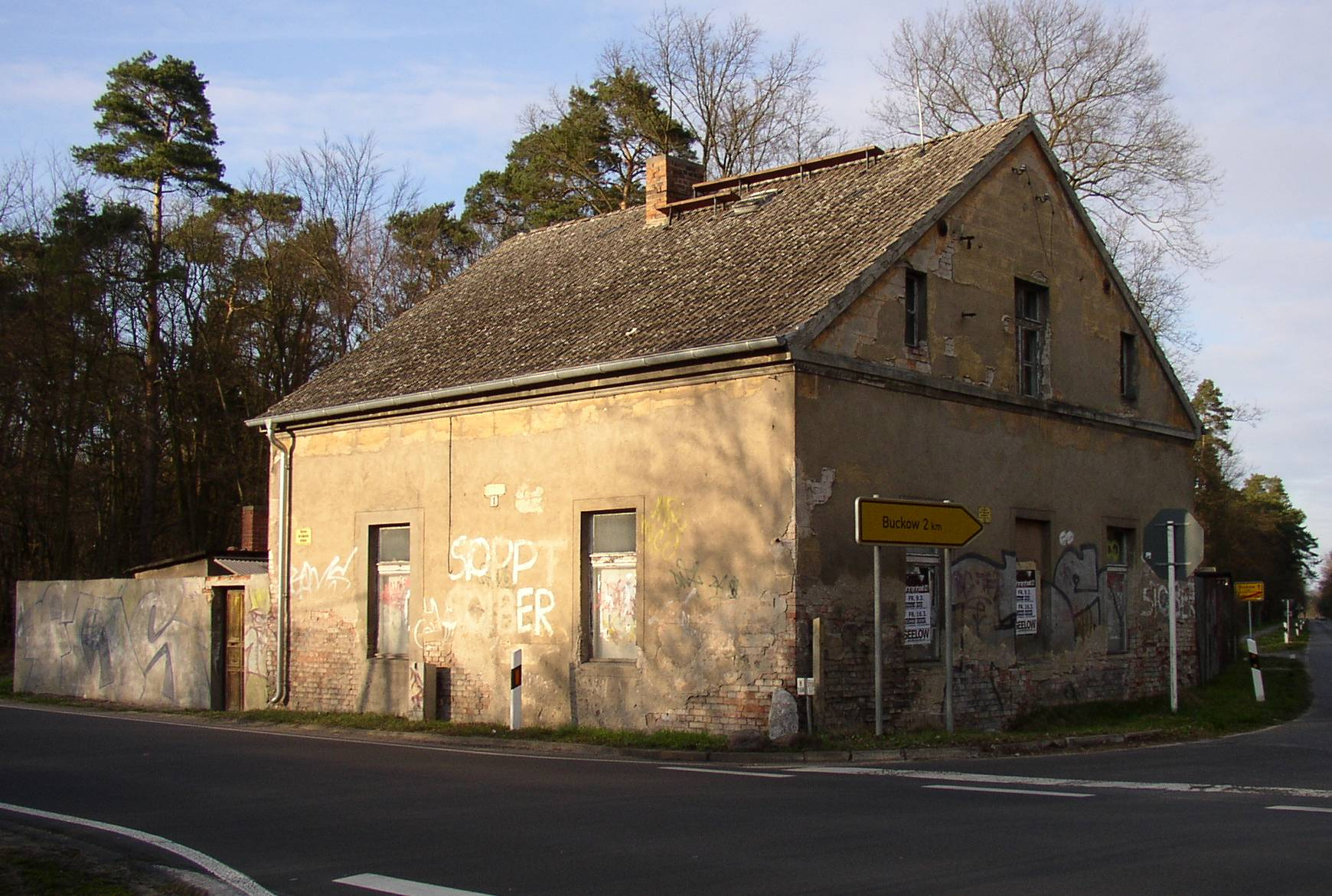 Chausseehaus in Waldsieversdorf in Brandenburg, Deutschland